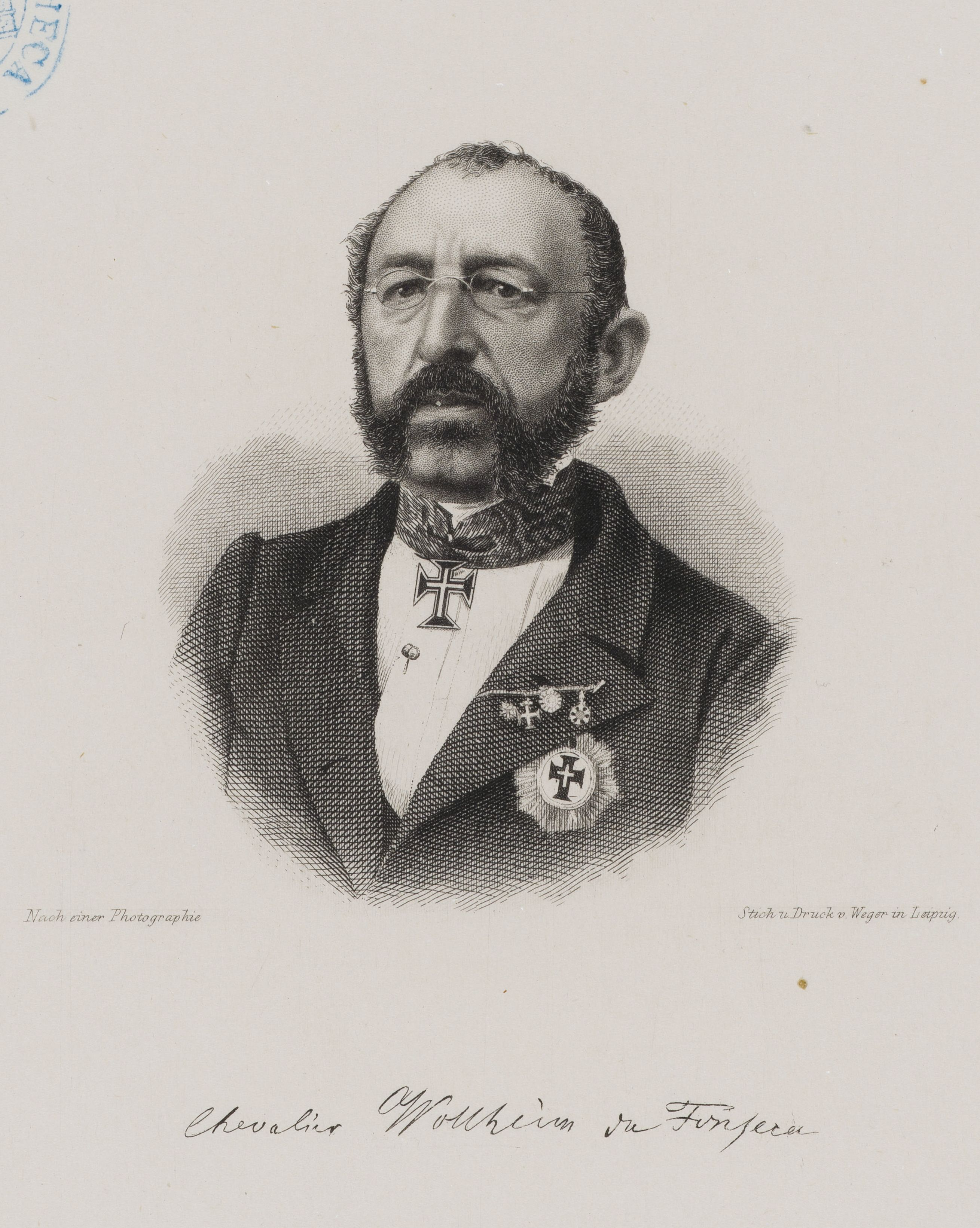 Bildnis von Anton Eduard Wollheim Dafonseca